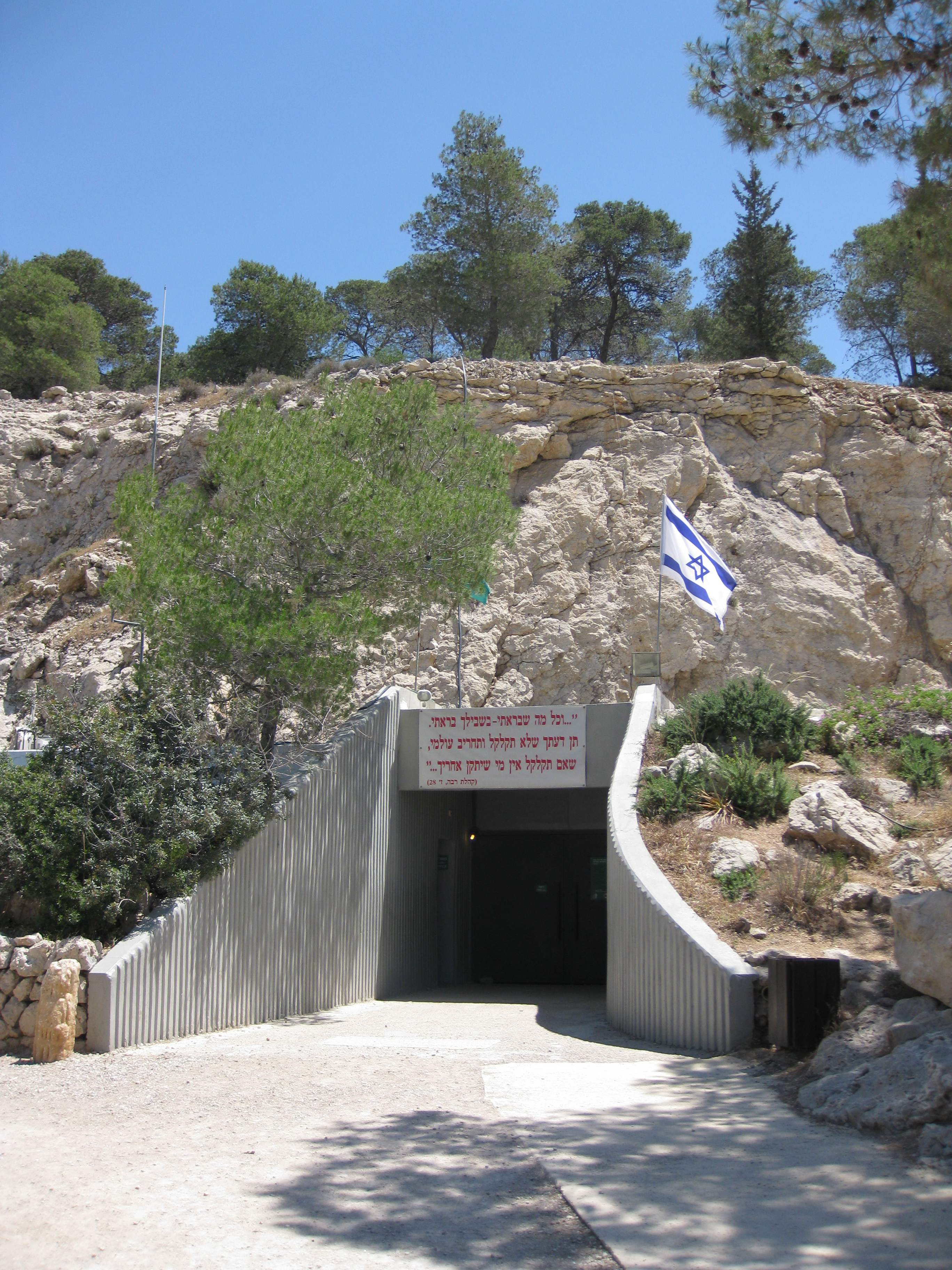 Avshalom's Cave - Soreq Cave מערת אבשלום